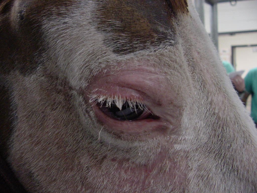 equine eyelid solar keratosis and squamous cell carcinoma in situ